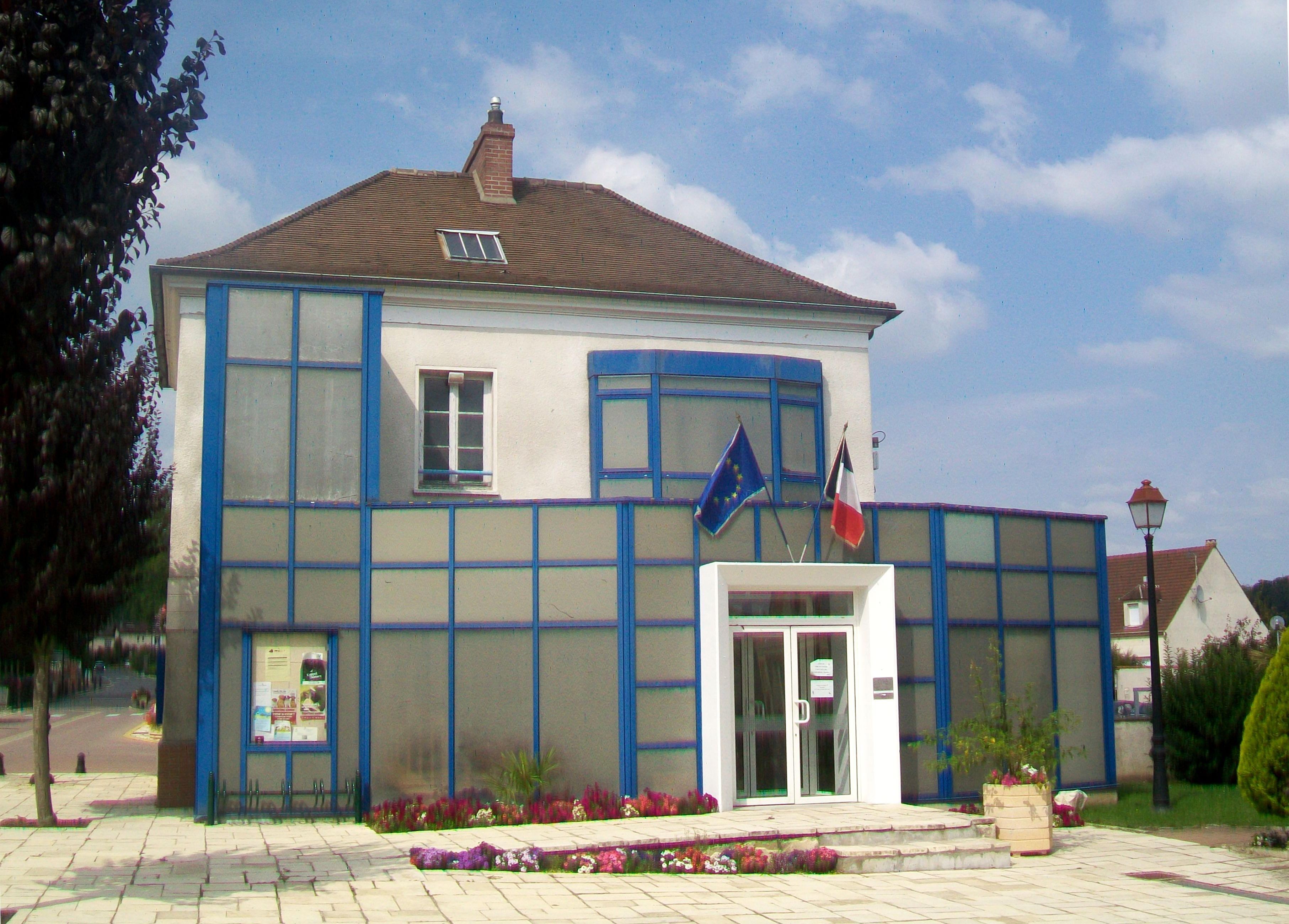 La mairie de Baillet-en-France, façade principale, rue Jean-Nicolas.